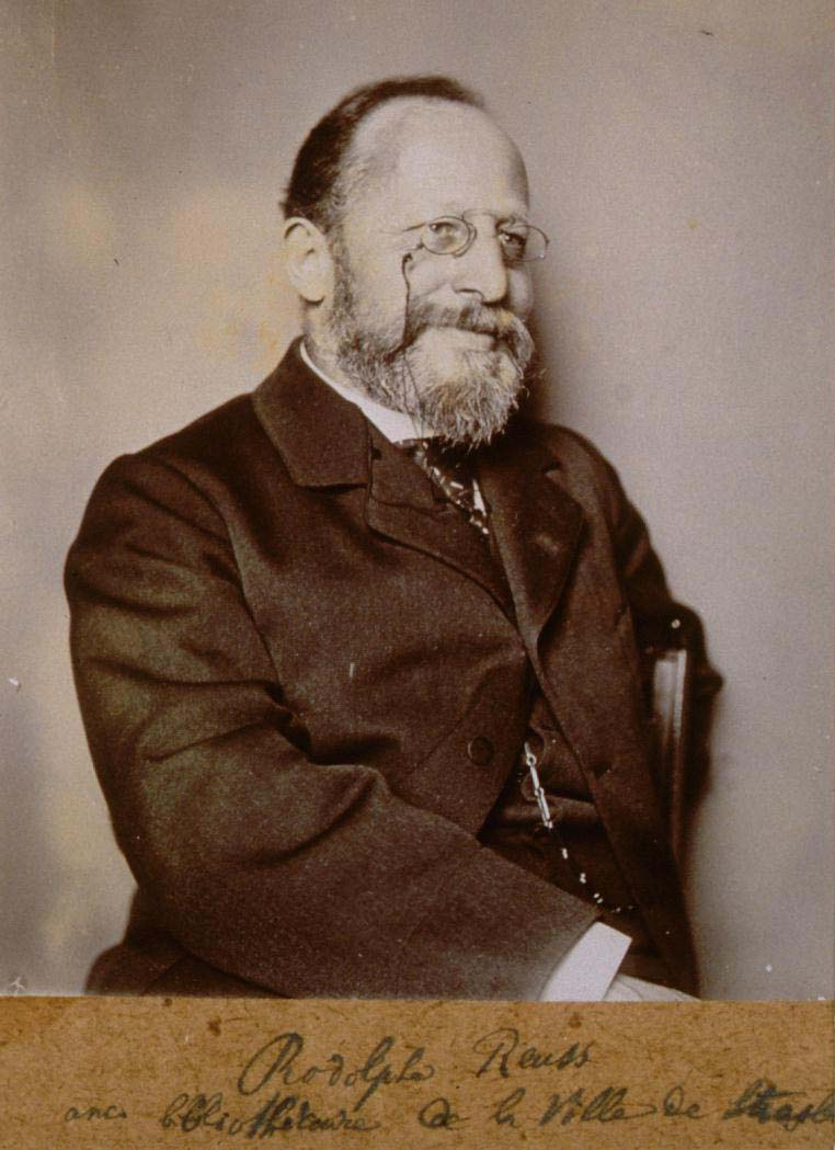 Rodolphe Reuss, ancien bibliothécaire de la ville de Strasbourg, Buste, 3/4 à dr (1880?). Légende de la photogr. de la main de Rod. Reuss.